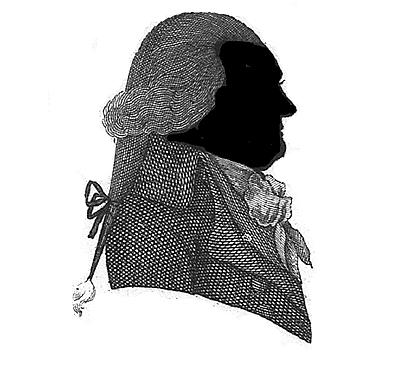 Portrait of Albert Johan de Sitter. Etching.